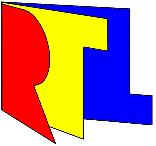 RTL Plus Logo - Neu erstellt da das "alte" in Wikipedia falsch gemalt wurde.